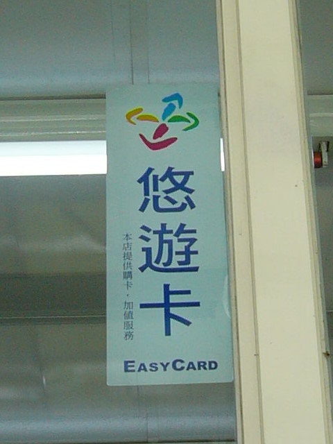 悠遊卡購卡及加值服務據點識別貼紙Bân-lâm-gú: Iu-iû-khah bé khah kah ka-ti̍t ho̍k-bū kì-tiám ê sik-piat tah-tsuá.悠遊卡買卡佮加值服務據點的識別貼紙。